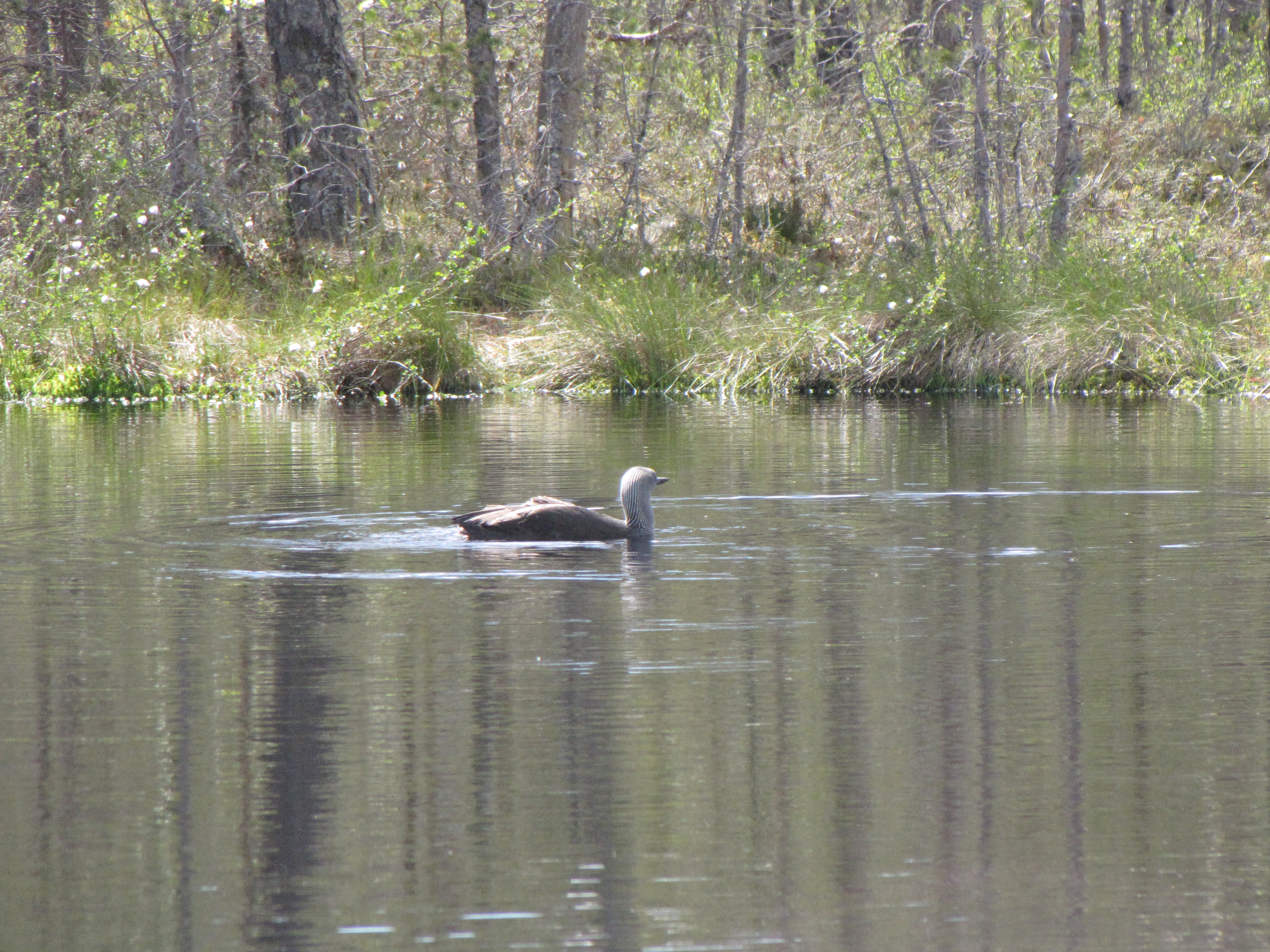 Smålom i en göl på Knuthöjdsmossen nära Hällefors.